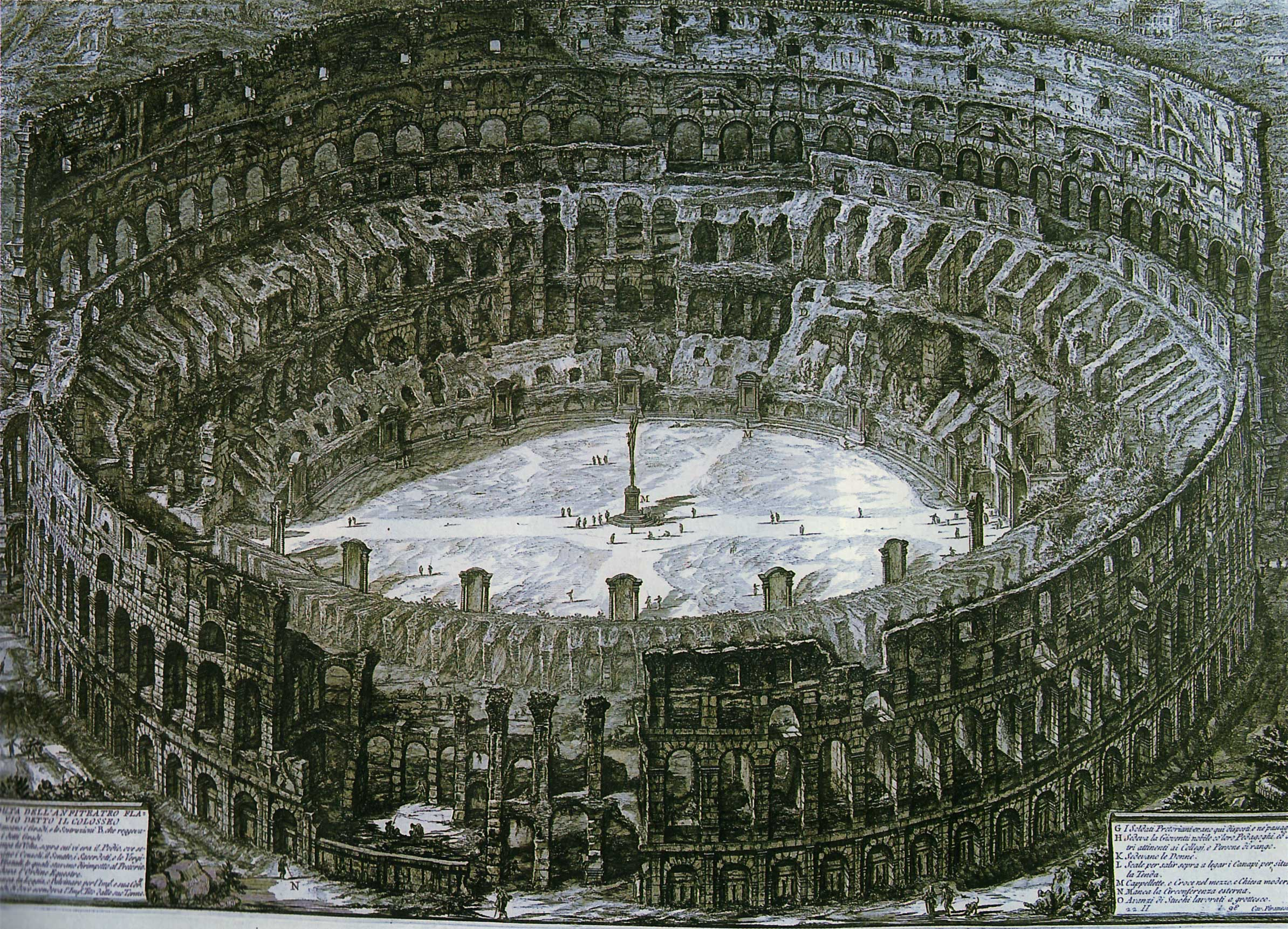 Giovanni Battista Piranesi: "Interno del Colosseo con edicole per la Via Crucis" 1750 circa. Incisione (Colosseum with Stations of the Cross. Engraving)